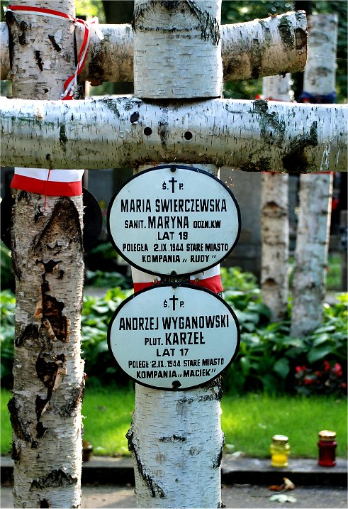 Grób na Powązkach Wojskowych w Warszawie